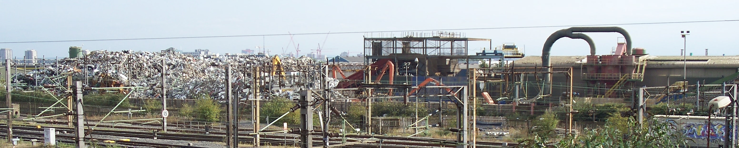 Willesden Waste Depot, London